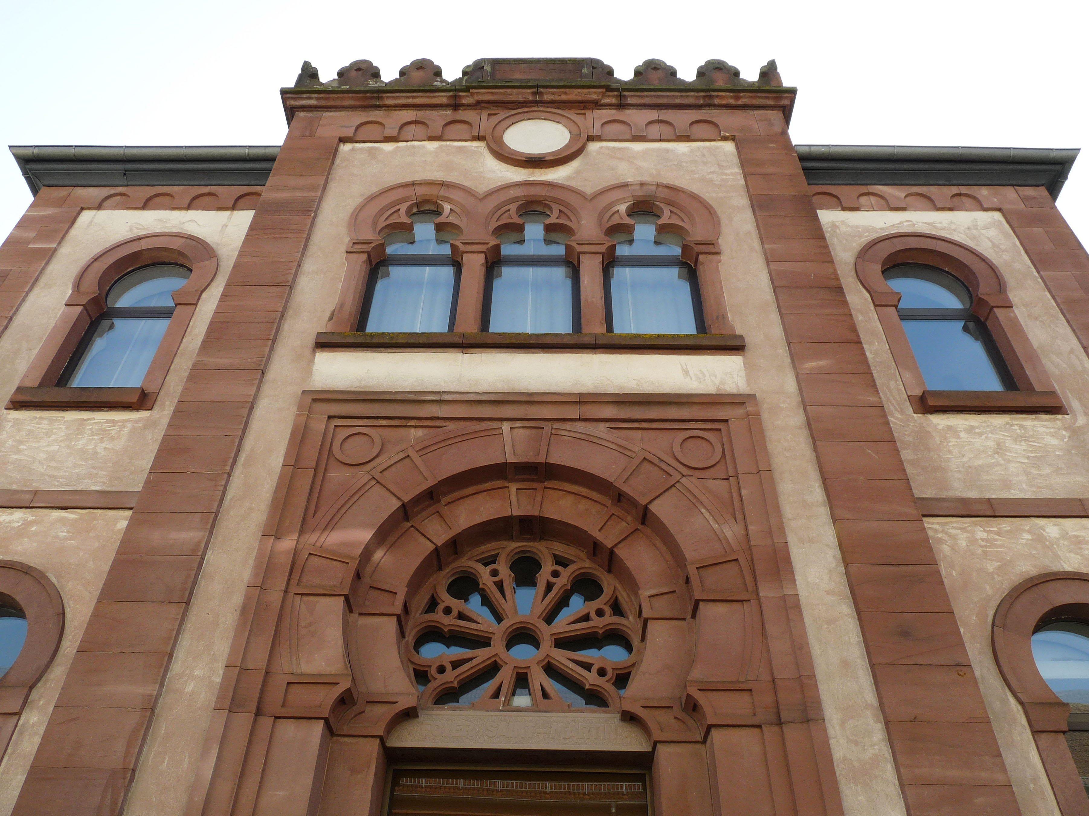 Ancienne synagogue de Niederbronn (Bas-Rhin). Terminée en 1869. Actuellement Foyer paroissial catholique. Inscrite à l'inventaire des monuments historiques.